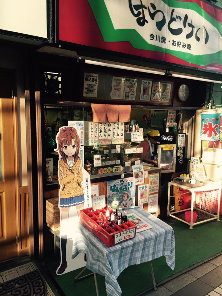 夏の衣笠商店街。アニメ「はいふり」とのコラボ企画。